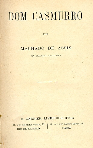 Cover page of Dom Casmurro \ Capa de Dom Casmurro, by Machado de Assis